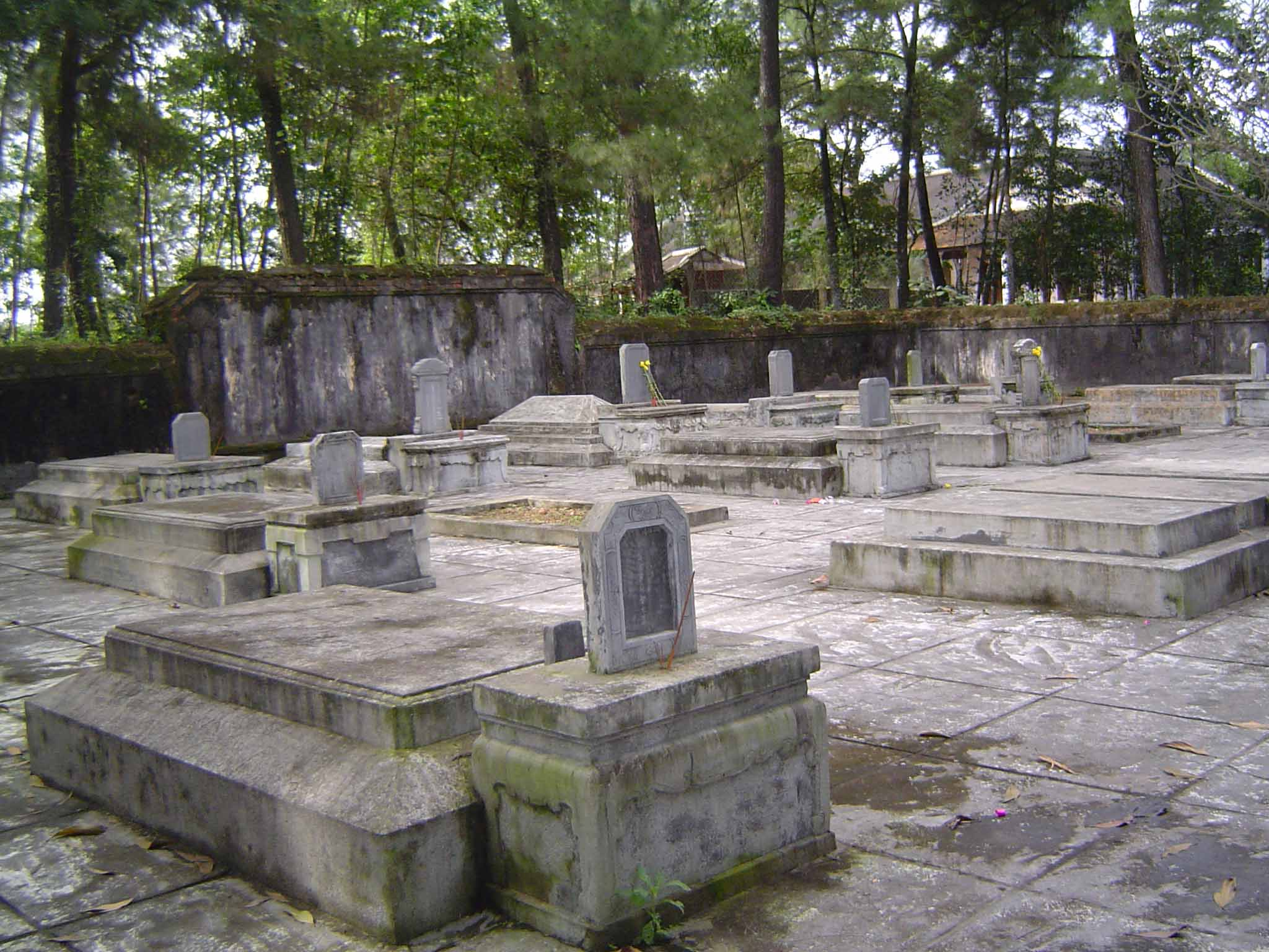 Hình do người truyền lên chụp. Nội dung: Lăng mộ Thái giám triều Nguyễn, Việt Nam trong khuôn viên chùa Từ Hiếu